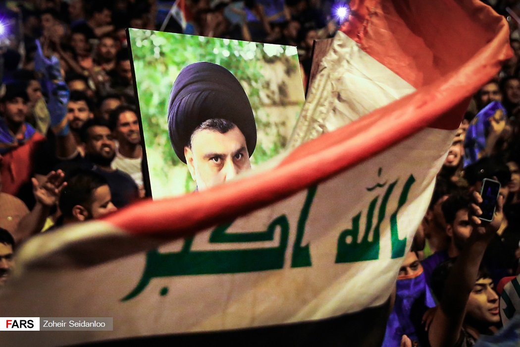 با پایان یافتن چهارمین دوره انتخابات پارلمانی جمهوری عراق، کار شمارش آرا آغاز و مردم هوادار ائتلافها و جریانات مختلف سیاسی عراق نتیجه این رویداد را دنبال میکنند. بامداد دوشنبه ۲۴ اردیبهشت ۱۳۹۷ به وقت تهران، برخی هواداران احزاب و جریانات سیاسی خصوصا حامیان ائتلاف سائرون نیز با حضور در خیابانهای بغداد پایتخت عراق به شادی و پایکوبی پرداختند.